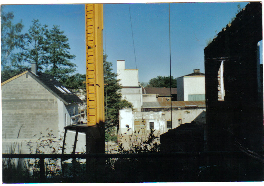 Die Papierfabrik Kayser nach dem 1.Abbruch 2005 vom Richelenberg aus.